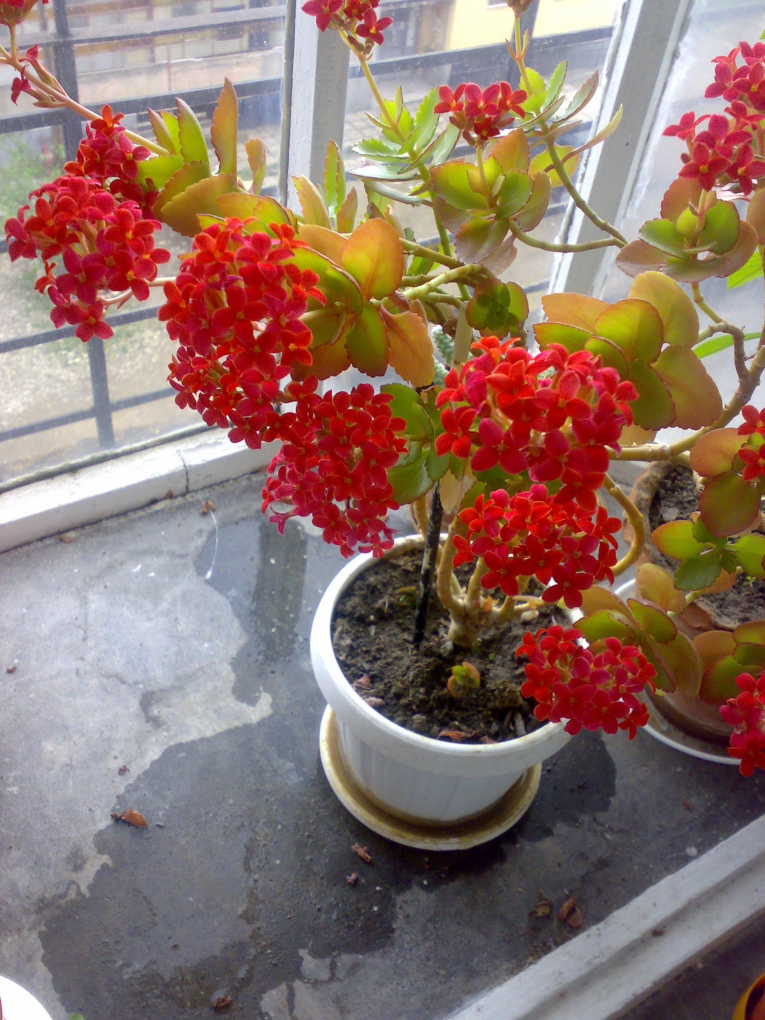 Изображение на домашно червено каланхое